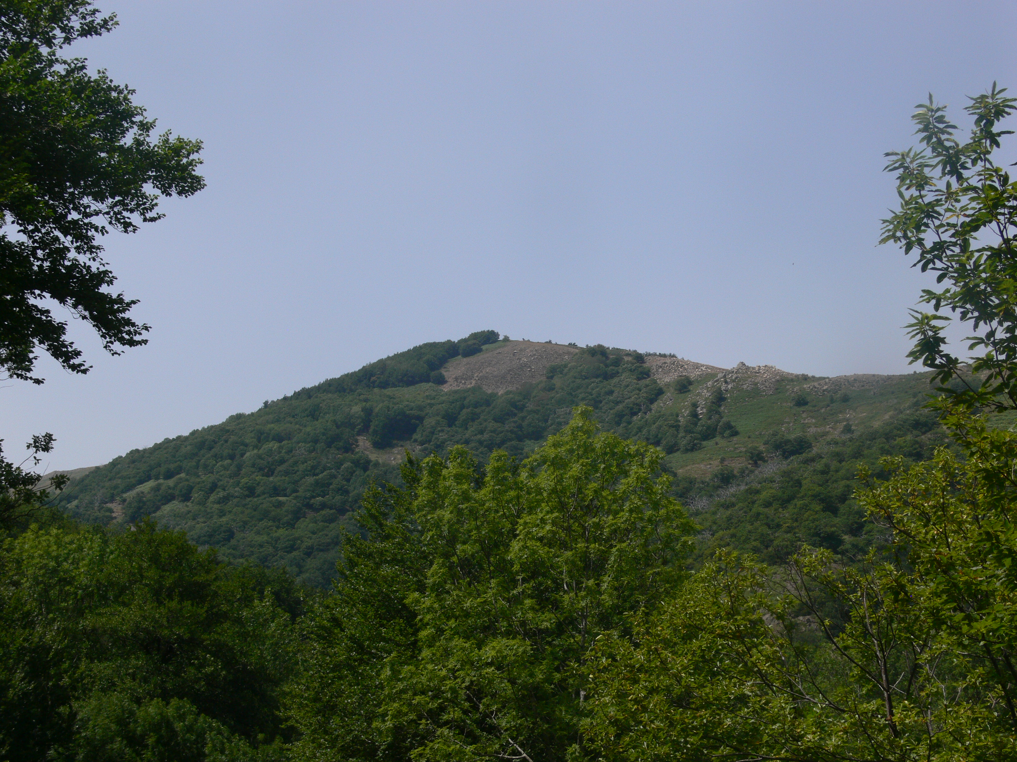 Saint-Pierreville - colline